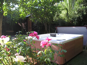 Hot tub en jardin Ñuñoa-Chile